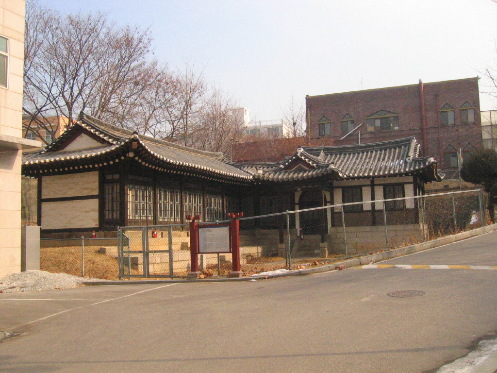 도정궁 경원당은 현재 건국대학교 캠퍼스 내에 자리 잡고있다.